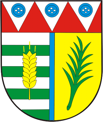 Znak udělený v roce 2000 obci Krásensko. Pod červenou hlavou se třemi stříbrnými klíny a na nich třemi modrými knoflíky, poltěný štít úzkým kůlem. V levém sedmkrát stříbrno-zeleně děleném poli zlaty obilný klas, v pravém zlatém poli zelený palmový list.[1]